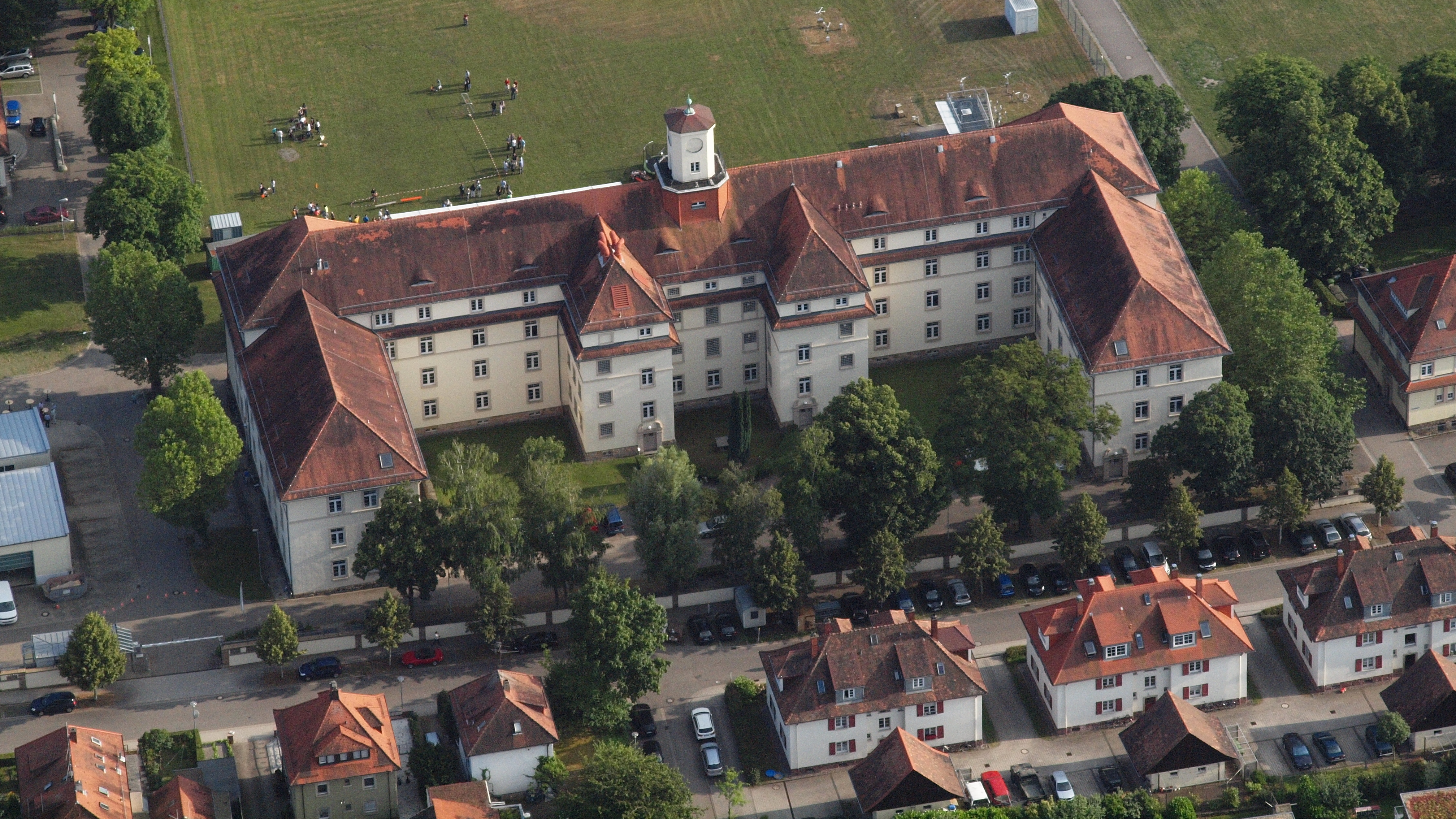 Ettlingen, Fraunhofer Institut IOSB: Luftaufnahme aus nördlicher Richtung